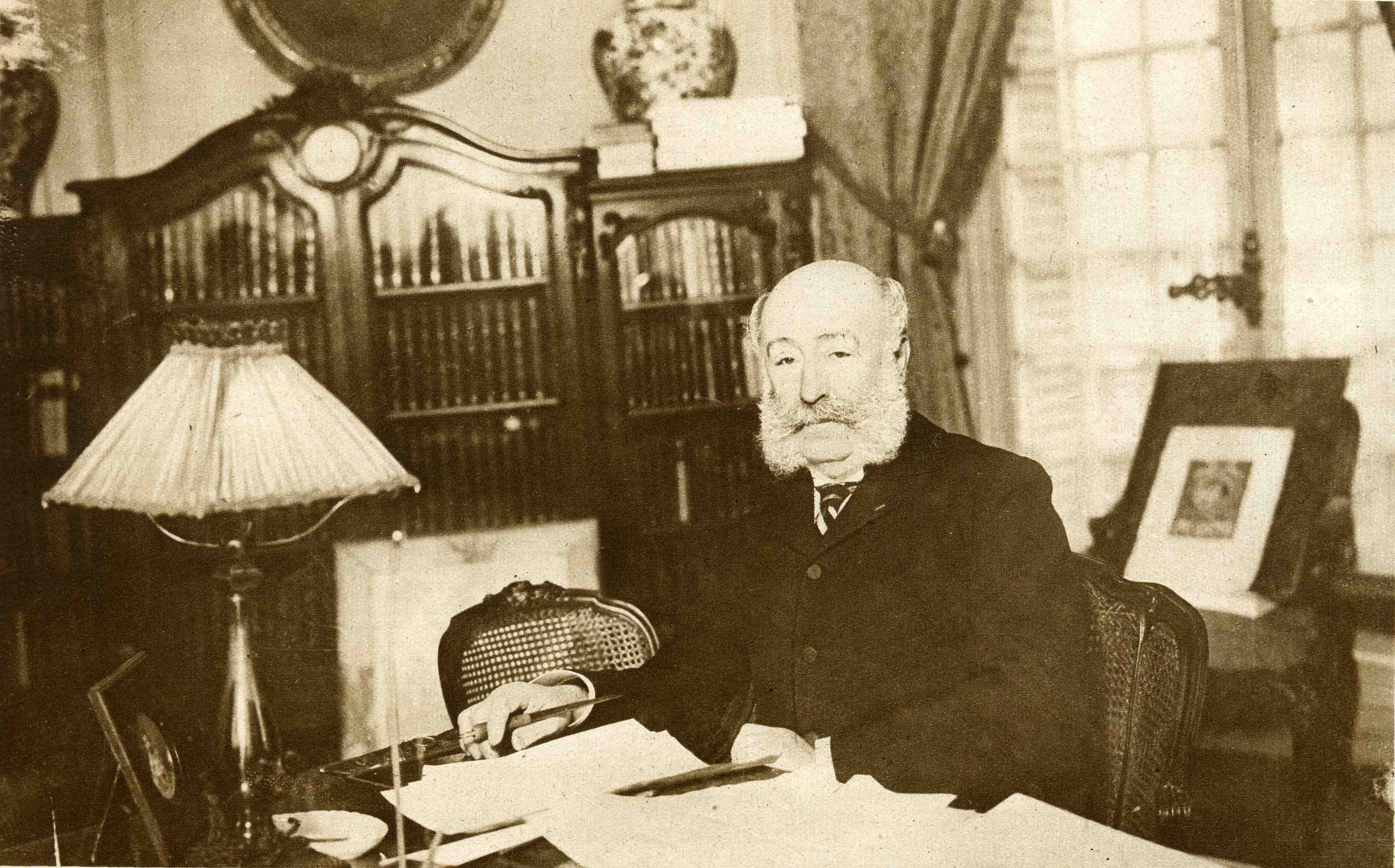 "M. Arthur Meyer dans son cabinet de travail" (patron de presse du Gaulois et auteur dramatique Arthur Meyer)